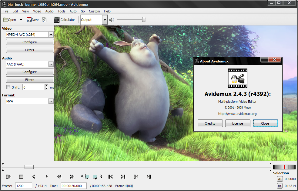 Screenshot von Avidemux v2.4 mit einer Szene aus dem Film Big Buck Bunny